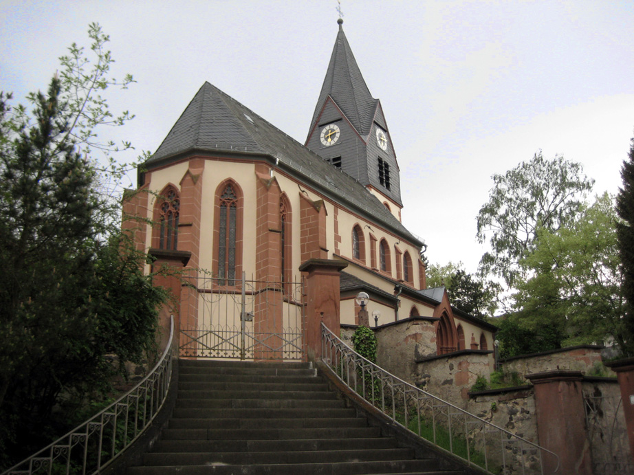 Kirche in Geiß-Nidda, fotographiert von der Kirchstraße aus